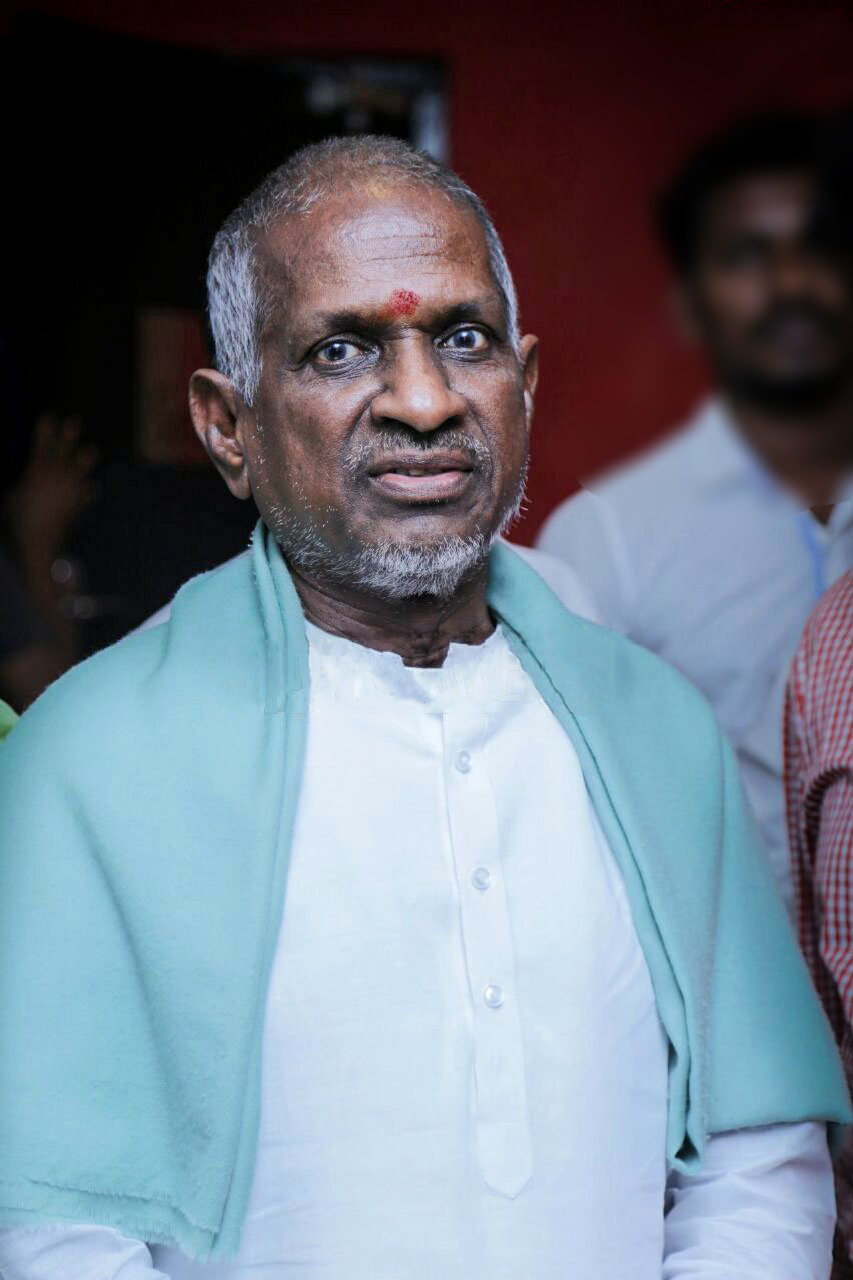 Ilaiyaraaja at Shamitabh Press Show